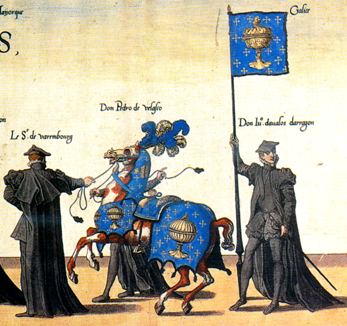 Anaco da obra "Pompas fúnebres do emperador Carlos V" nel represéntanse todos os estandartes dos diferentes reinos que pertenceron en vida ao monarca